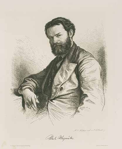 Portrait des Bildhauers Michael Wagmüller; Stadtmuseum München, inv. G M III/2781